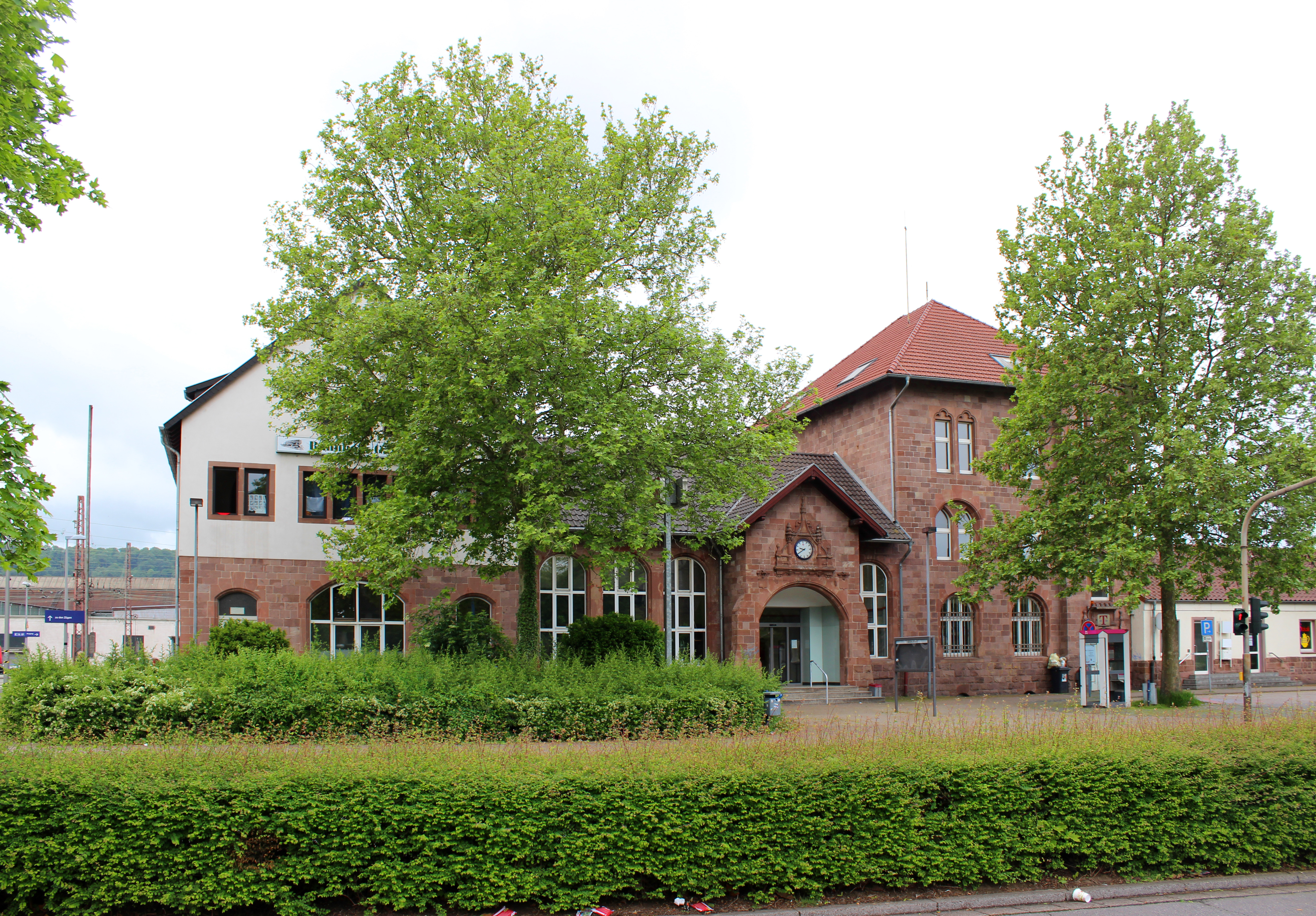 Dillingen, Landkreis Saarlouis, Saarland: Bahnhof Dillingen (Saar)